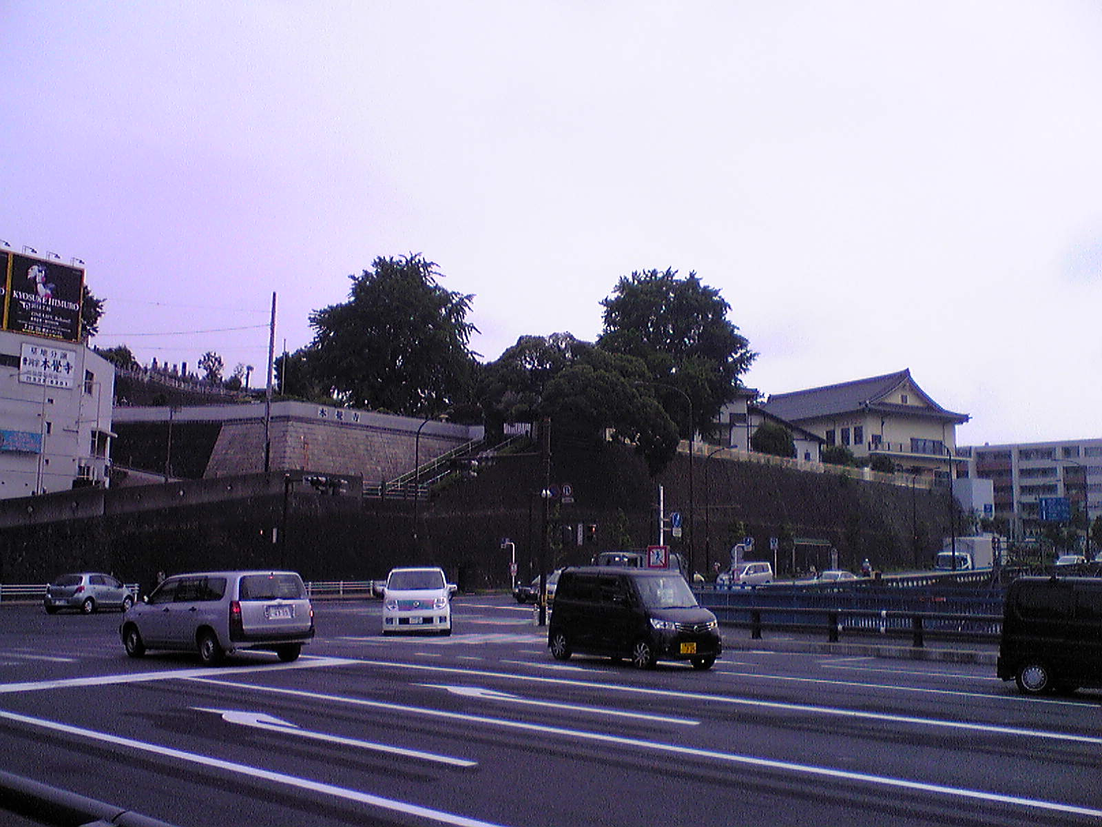 本覚寺遠景。旧東海道の[Kanagawa Daimachi.jpg]と同位置から撮影。